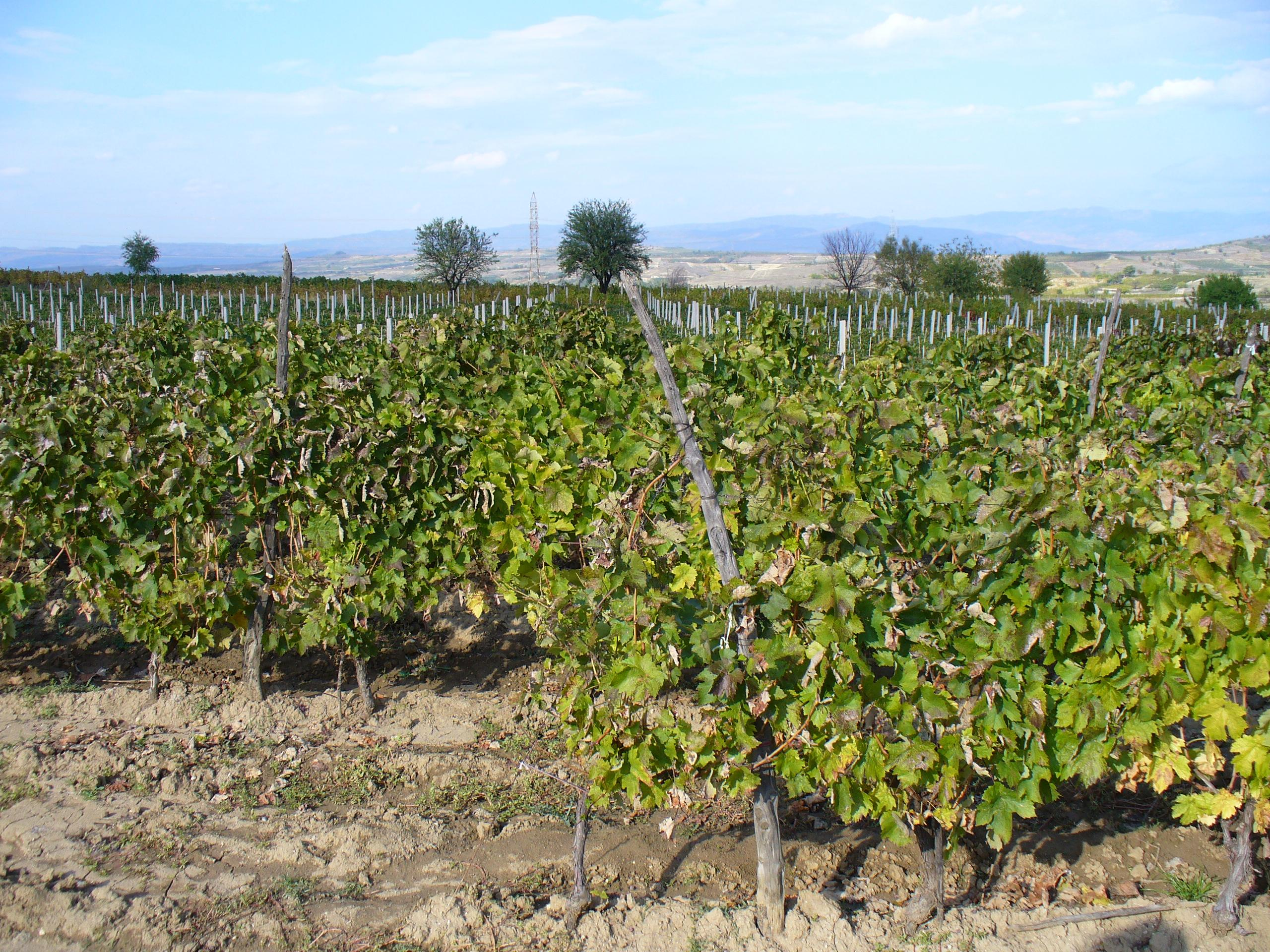 Tikveš